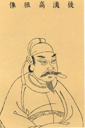 後漢高祖像